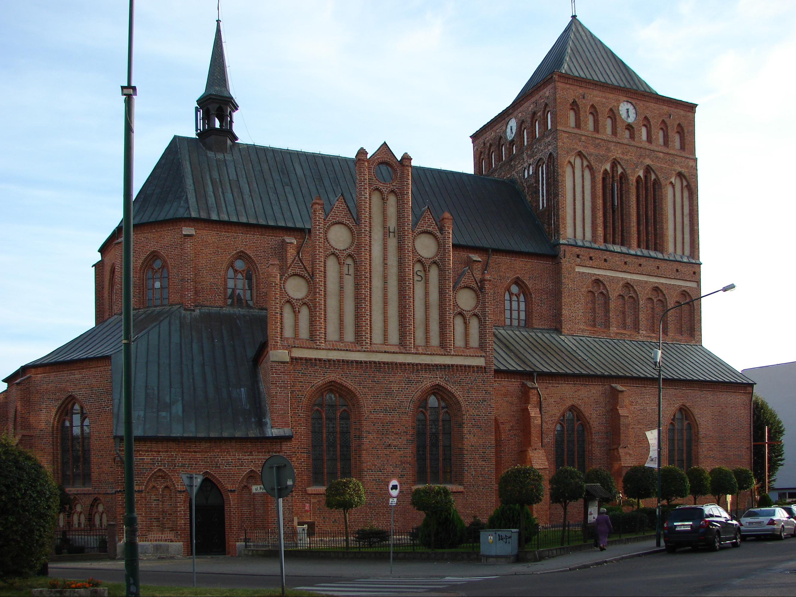 Świdwin, zespół kościoła par. p.w. Matki Boskiej Nieustającej Pomocy